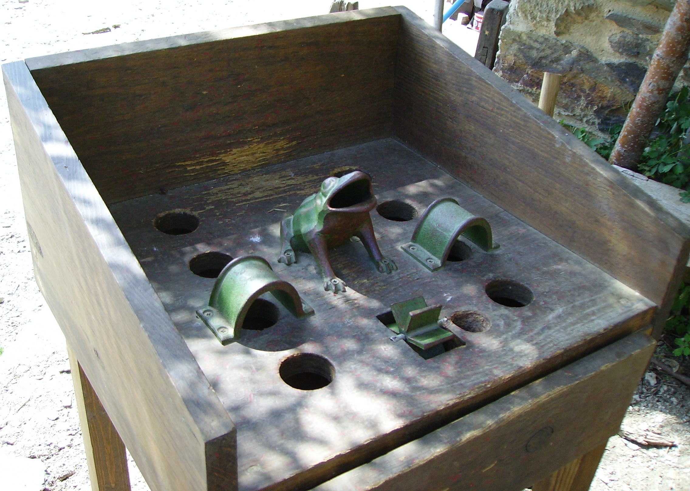 Juego de la Rana. Foto tomada en Palacios de Compludo (El Bierzo, León, España)